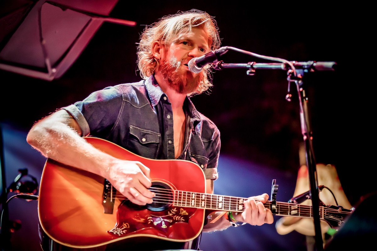 Björn van der Doelen tijdens een optreden in Roosendaal in 2015